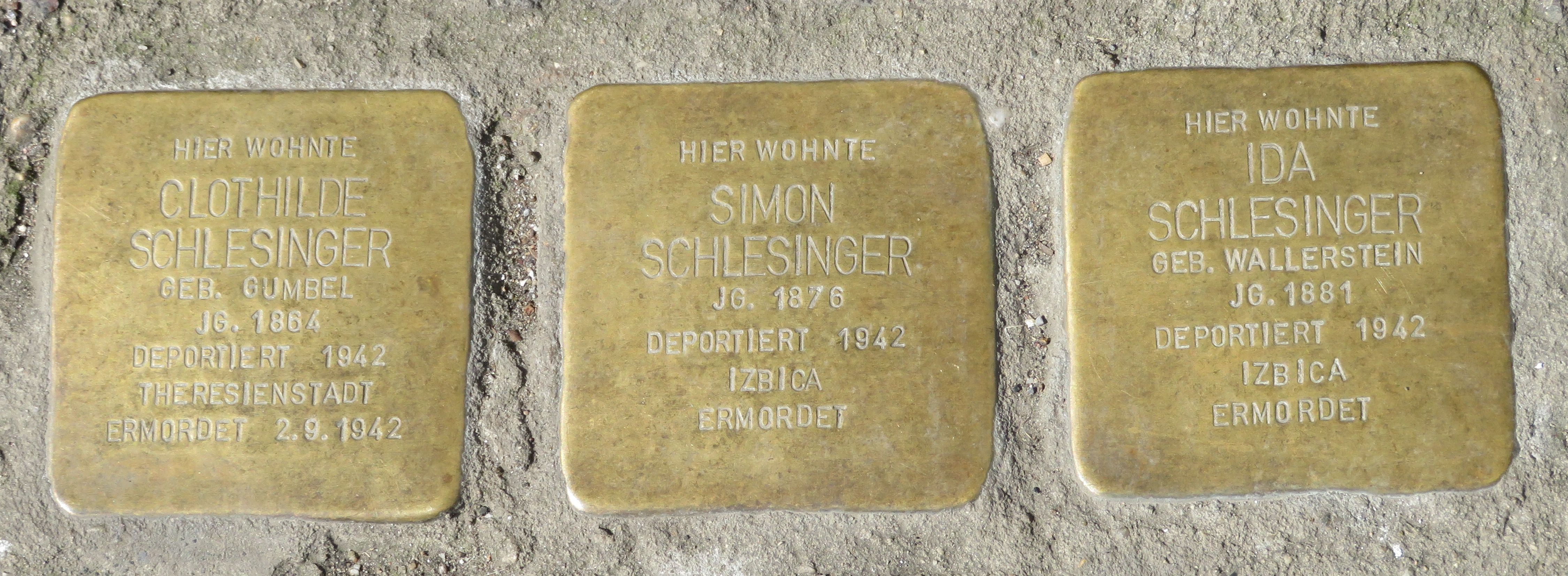 Stolpersteine für die Familie Schlesinger in Heilbronn, Gartenstraße